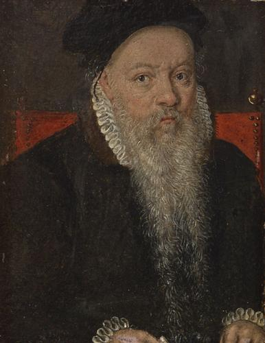 Georg Ilsung, Herr zu Tratzberg in Tirol, Reichspfennigmeister, gestorben 1580, Gemälde Papier auf Karton, Größe: 13,5 x 10,6 cm